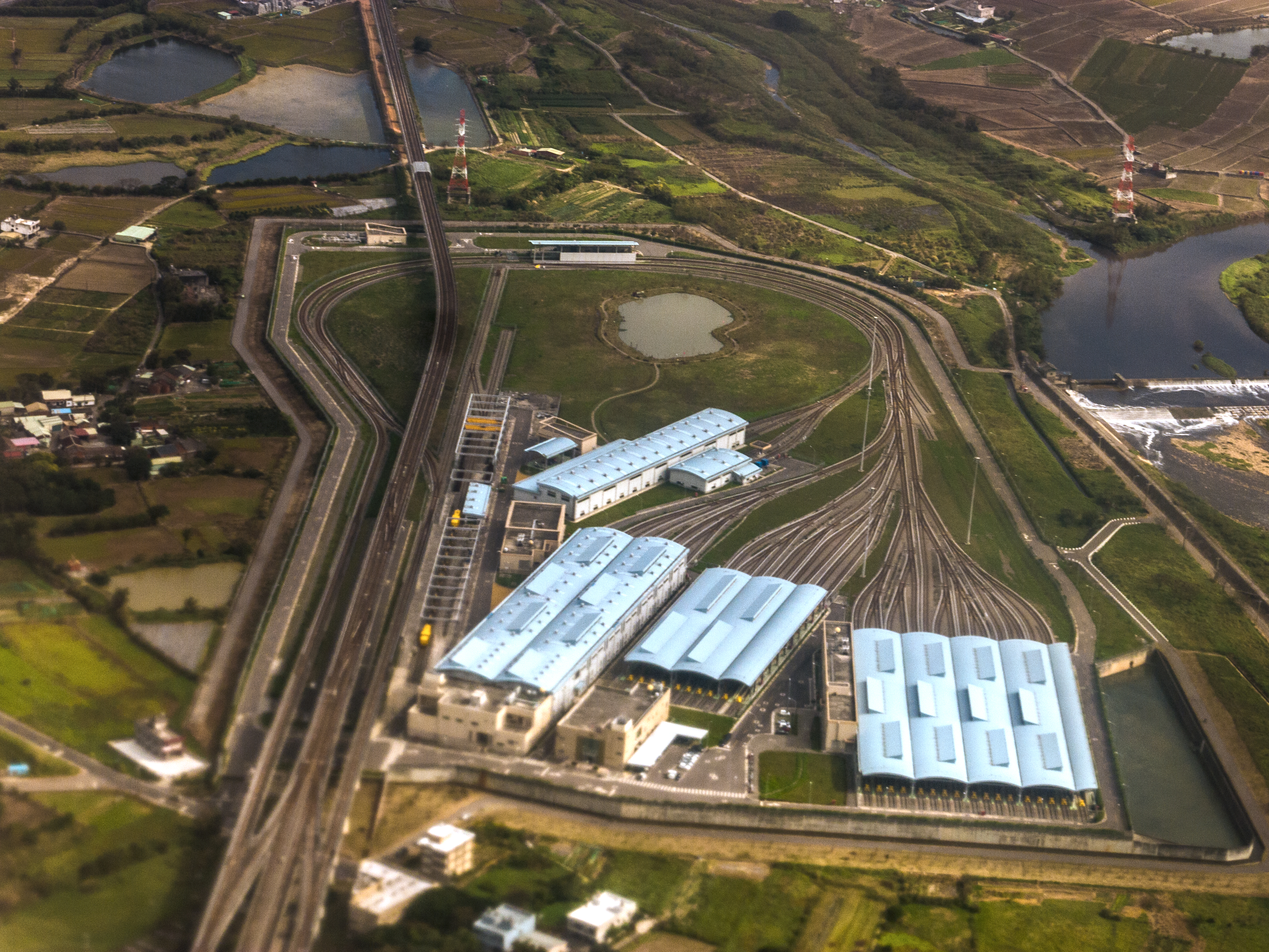 中文（台灣）: 桃園捷運機場線蘆竹機廠